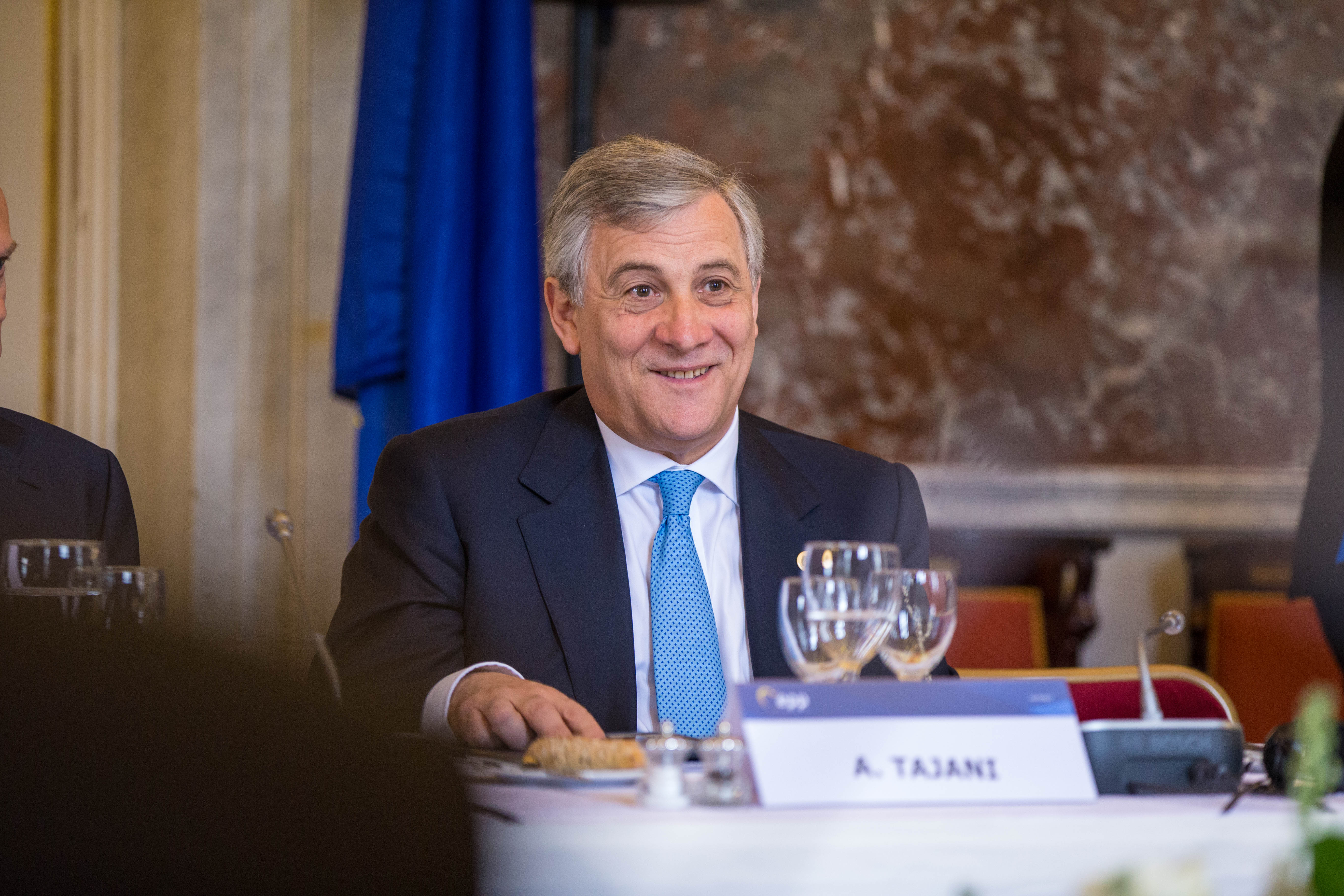 EPP Summit, Brussels, March 2017